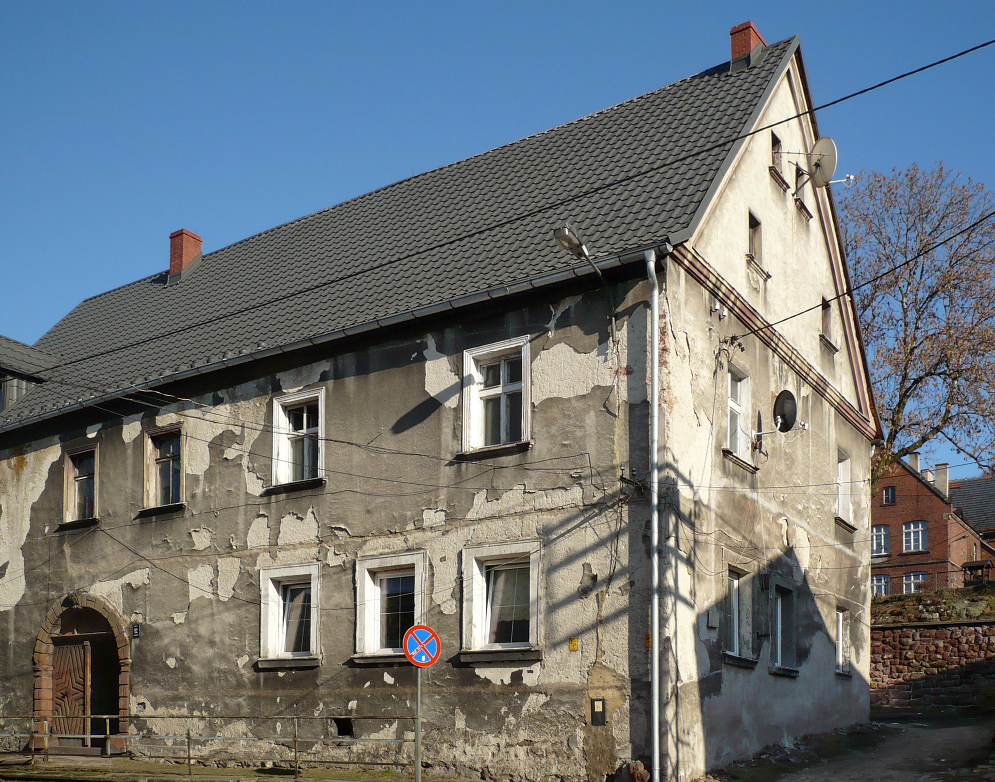 Nowa Ruda, ul. Kościelna 12 - dom